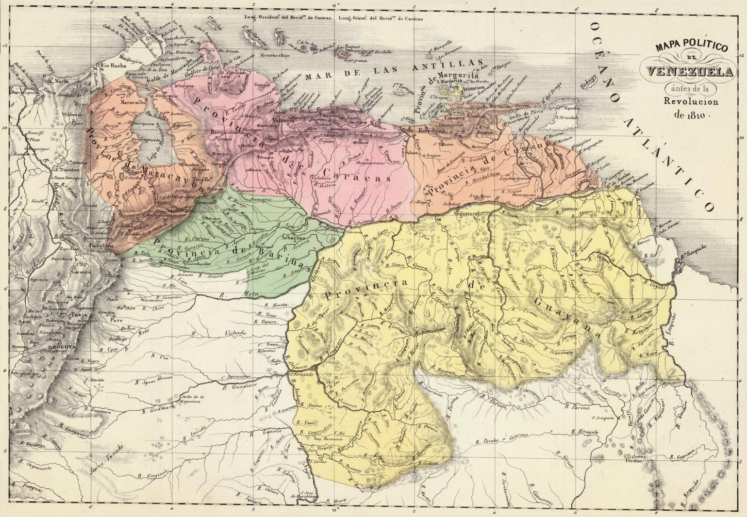 Mapa político de Venezuela en 1810. Tomado del "Atlas físico y político de la República de Venezuela", 1840.